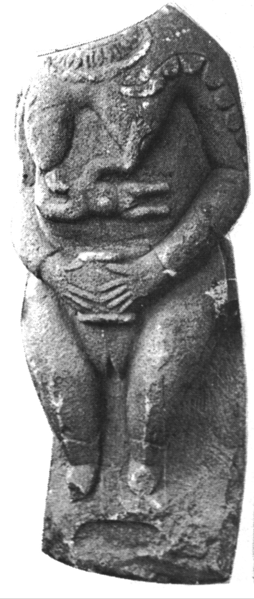 Kipchak stone baba (Ukraine)